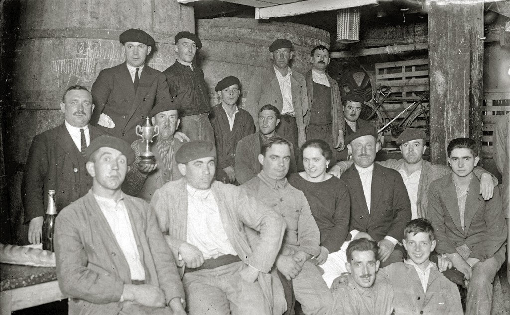 Gipuzkoako sagardotegia. 1928. Euskal Herria. Cider house in Gipuzkoa. 1928. Basque Country.